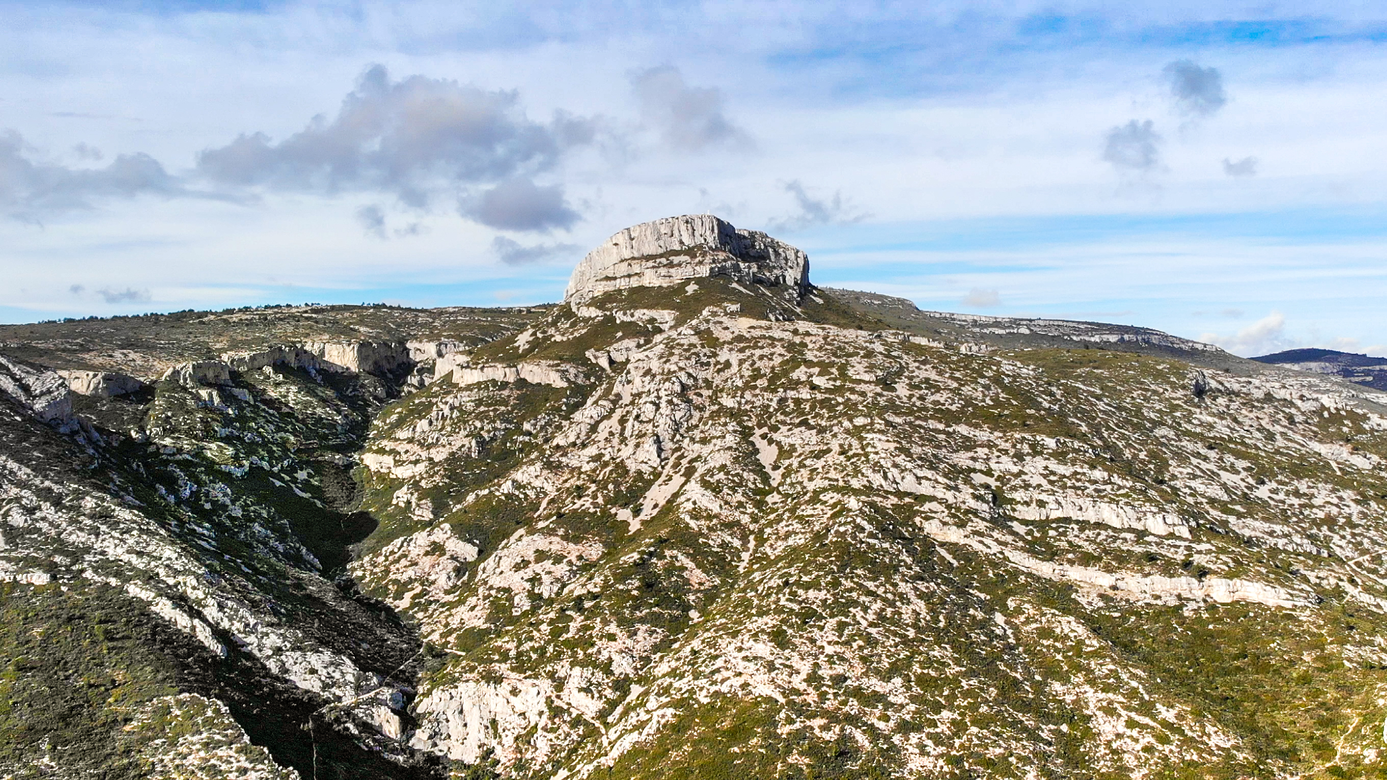 Vue aerienne du Garlaban en Provence-Alpes-Côte d'Azur